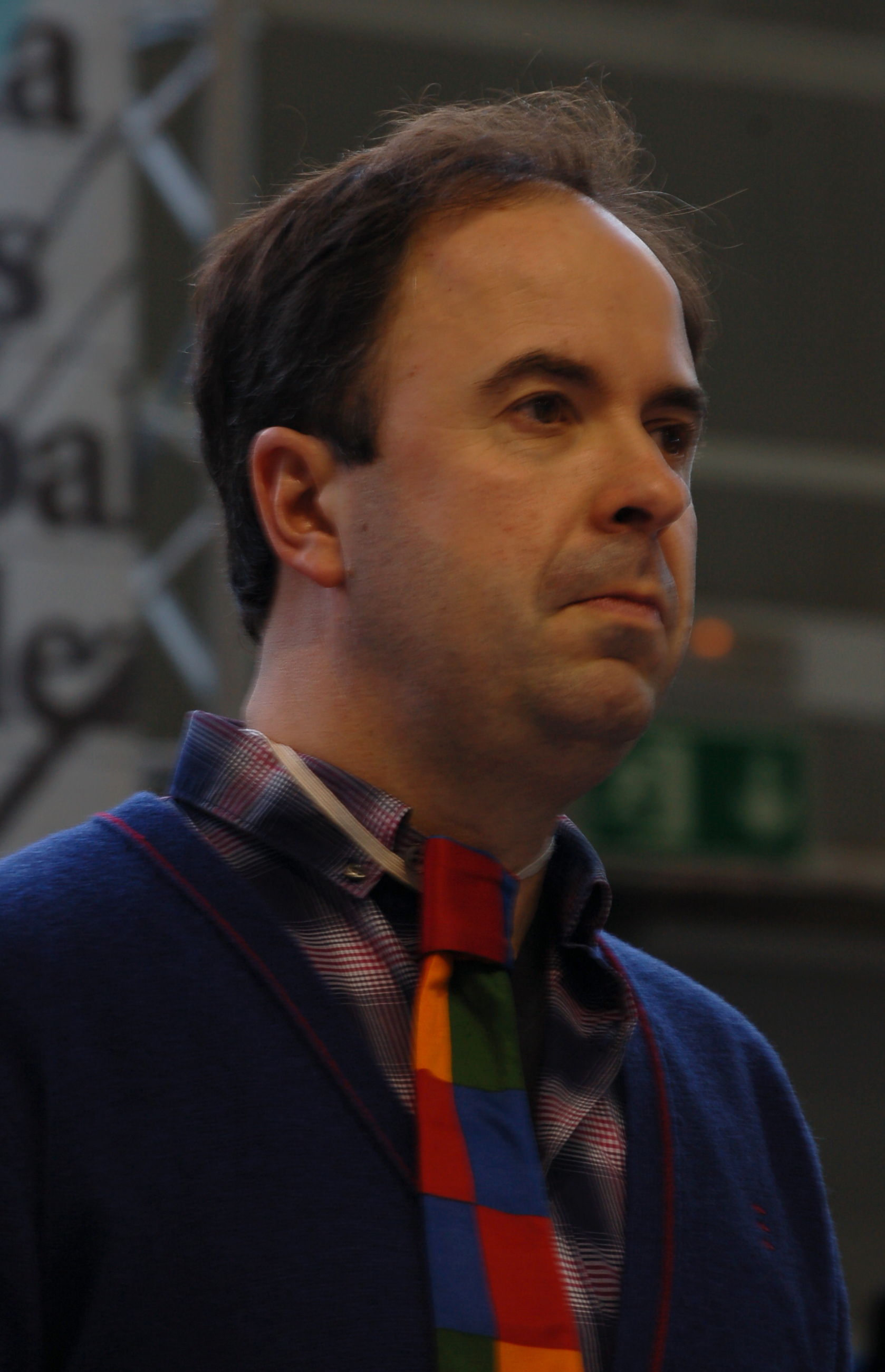 Carlos Negro presentando a obra 'Abelcebú', no CulturGal 2010 no Pazo da Cultura de Pontevedra